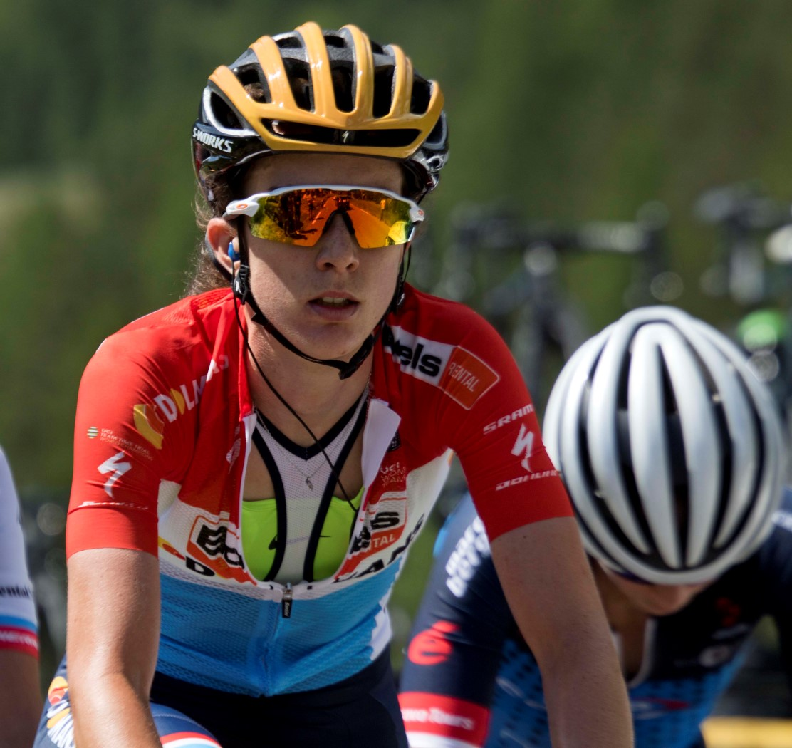 Christine Majerus op de Col d'Izoard tijdens de eerste etappe van La Course 2017